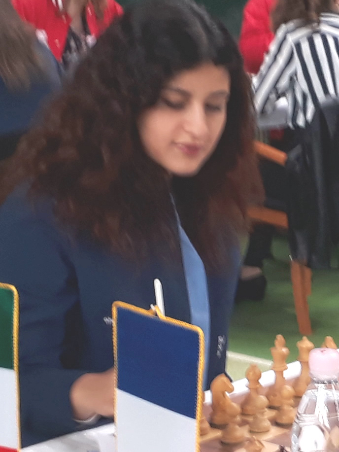 Tea Gueci, Runde 4, Mitropa Cup 2019 Frauen, Radenci.